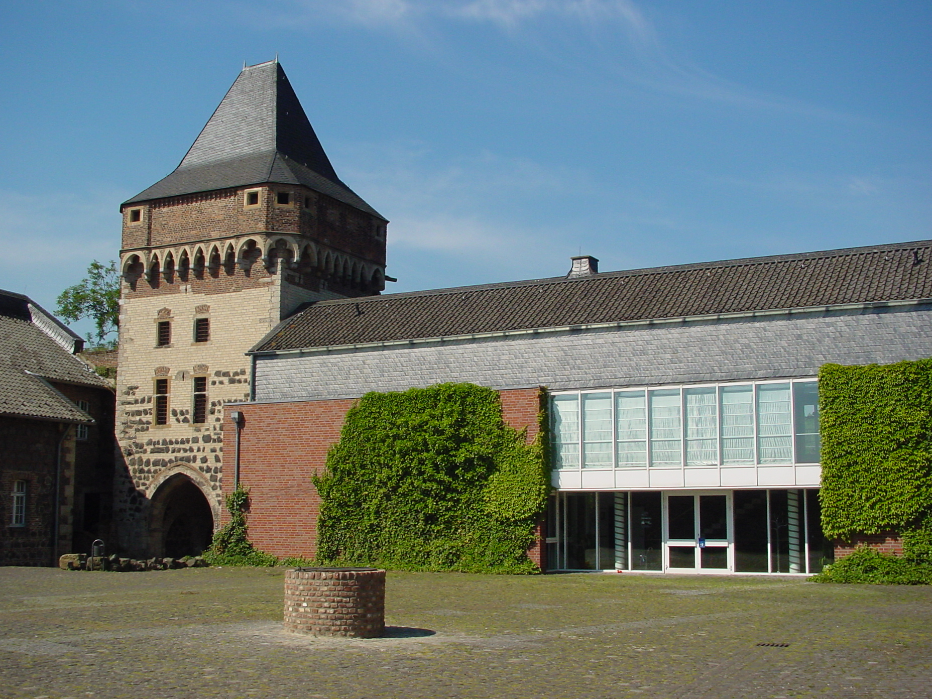 Vorderansicht des Archivgebäudes in der historischen Anlage von Burg Friedestrom (2004)